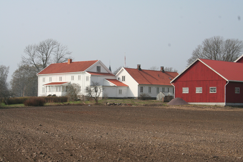 Borre prestegård sett fra sør/øst